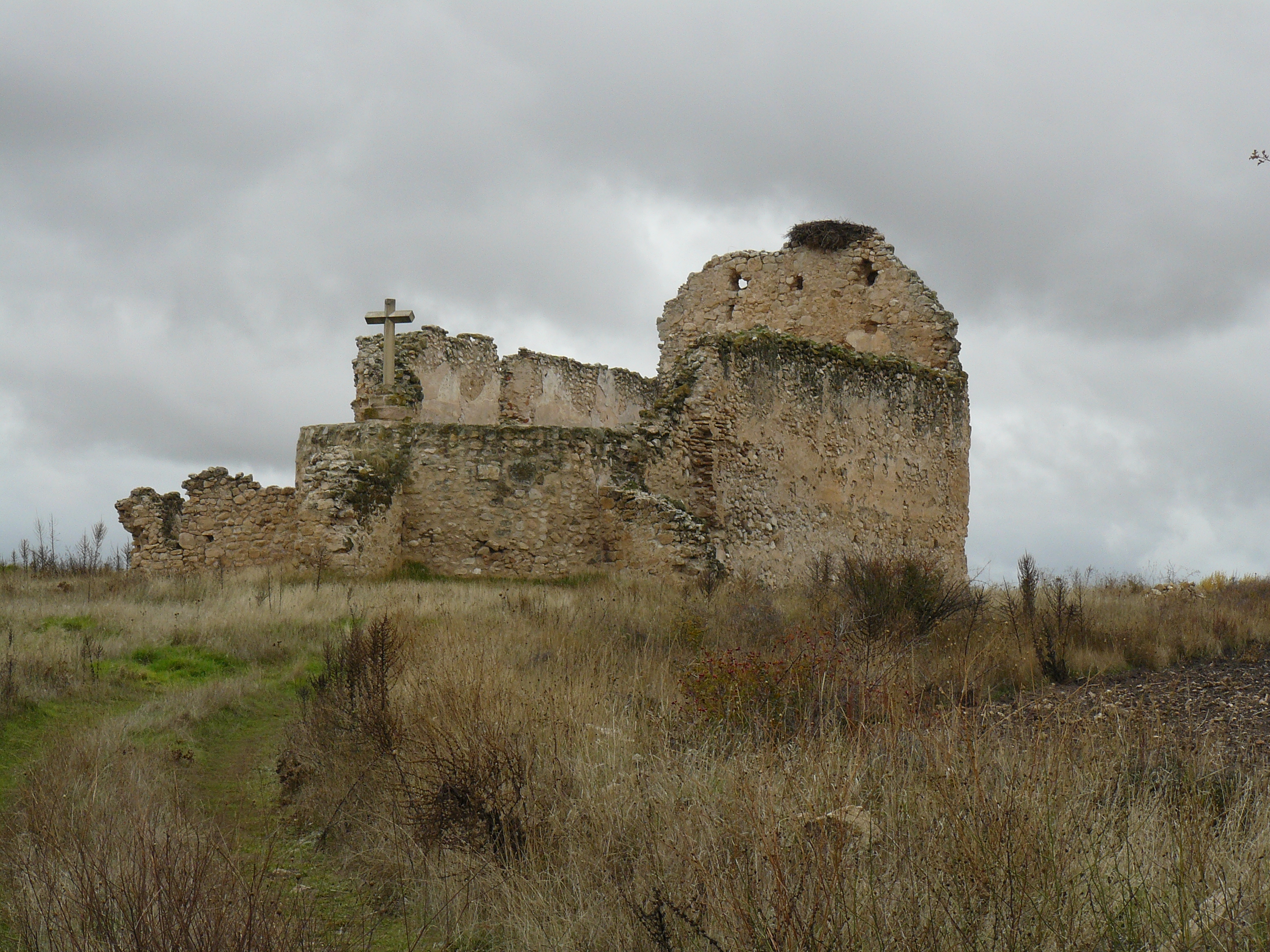 Iglesia de Nuestra Señora. de la Serna,Vellosillo, Segovia.